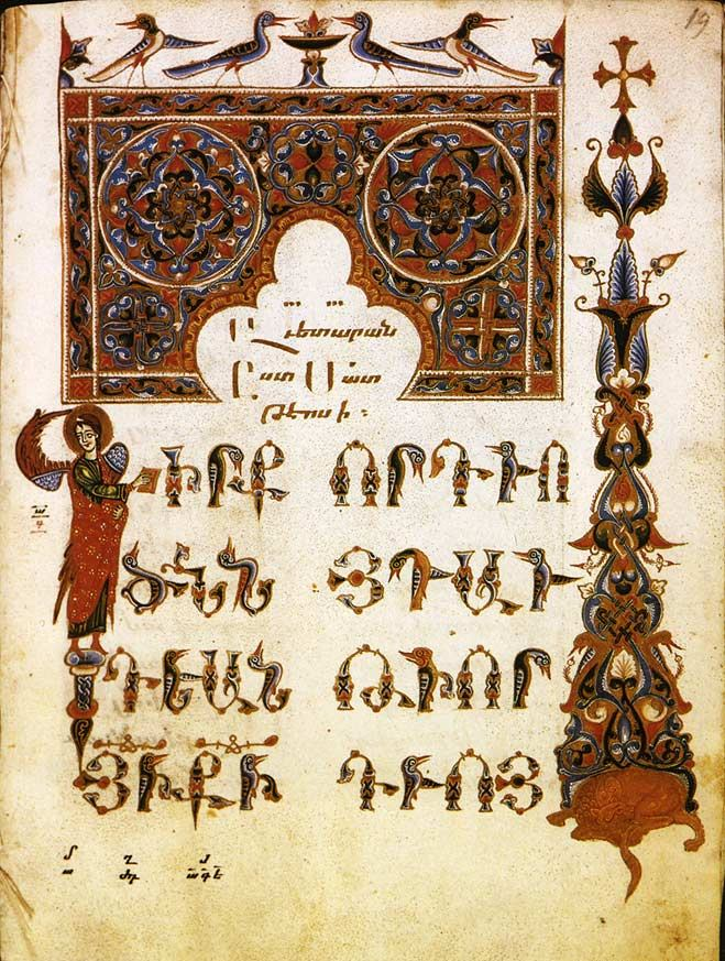 Миниатюра из Евангелия от Матфея. Мастер Саркис Пицак. Нач. XIII в. (Матен. 5786. Л.19)